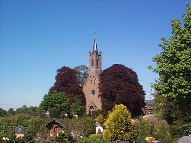 St-Antonius-Kirche Nütterden (Kranenburg), eingeweiht 1853, Denkmalschutz, Ansicht vom Friedhof This is a photograph of an architectural monument., no. 61.14